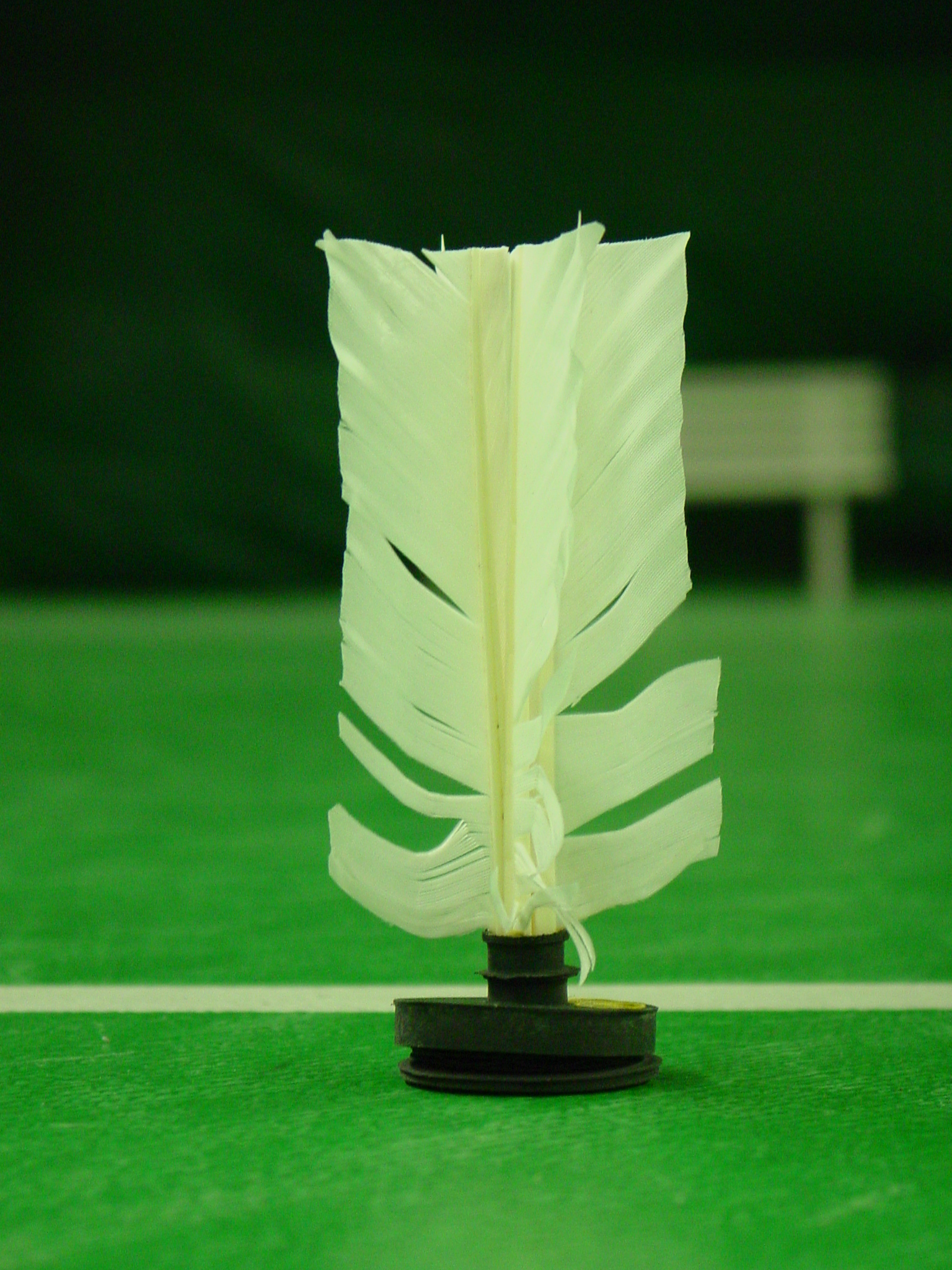 Federfußball